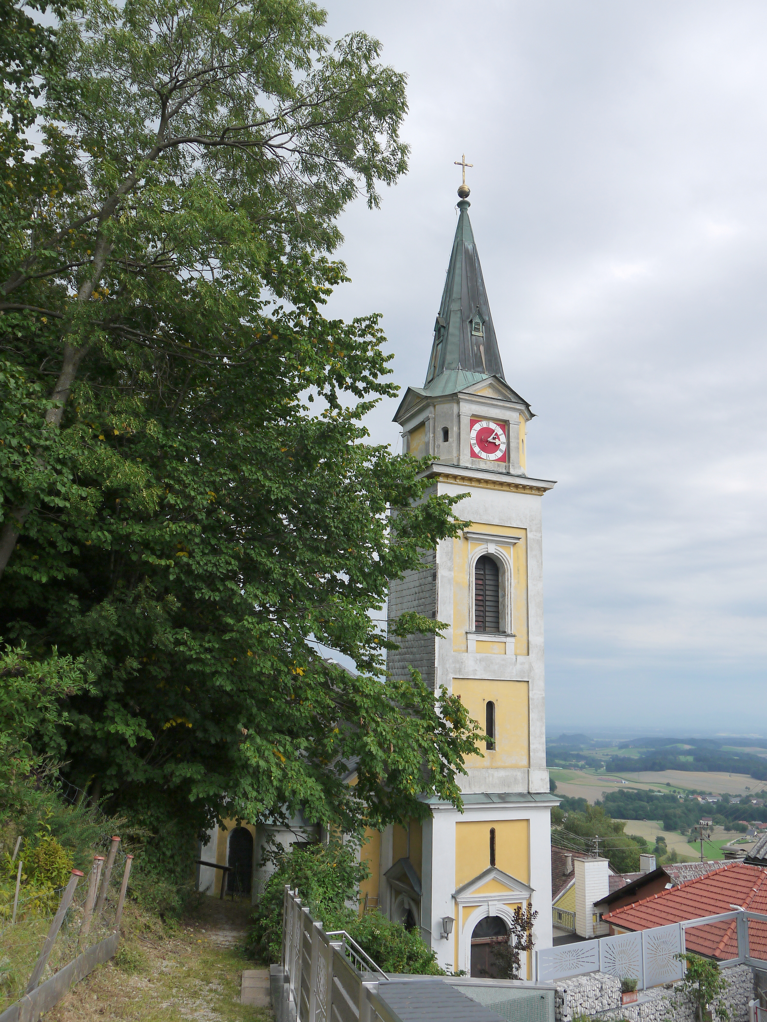 Kath. Pfarrkirche hl. Georg und ehem. Friedhofsfläche